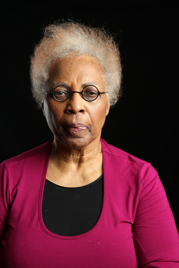 OPNAME IN MIJN WWERKRUIMTE DOOR Raúl Neijhorst